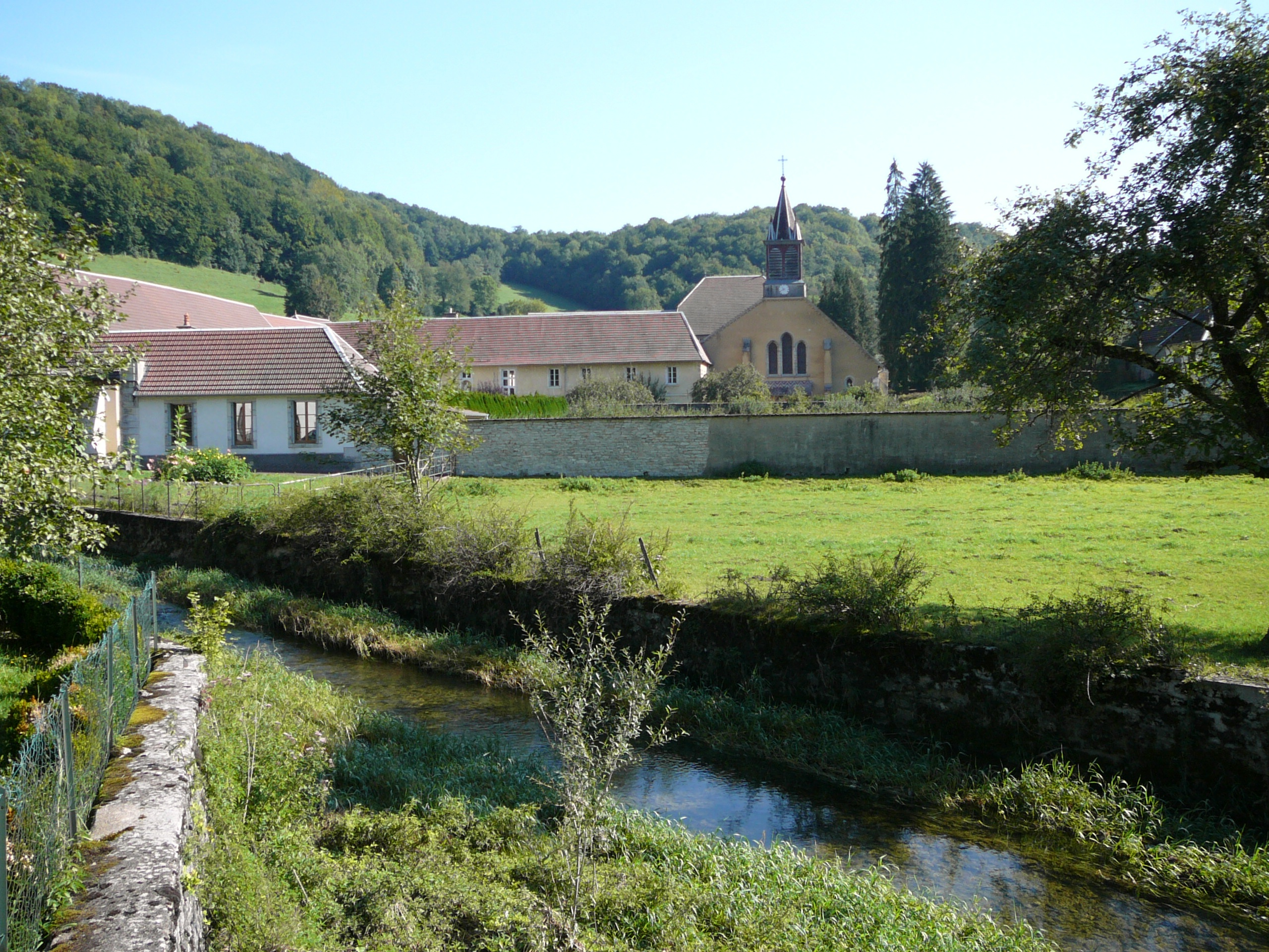 Abbaye de la Grace-Dieu, à Chaux-lès-Passavant